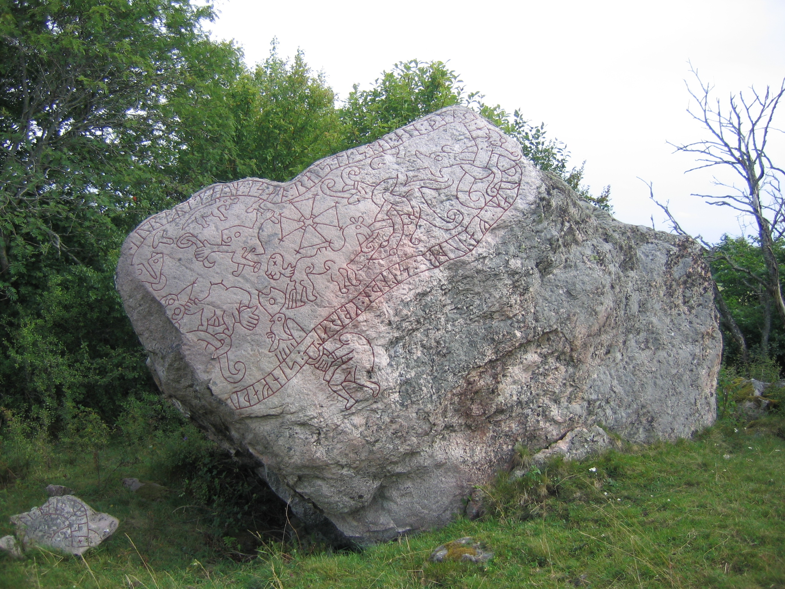 Runestone